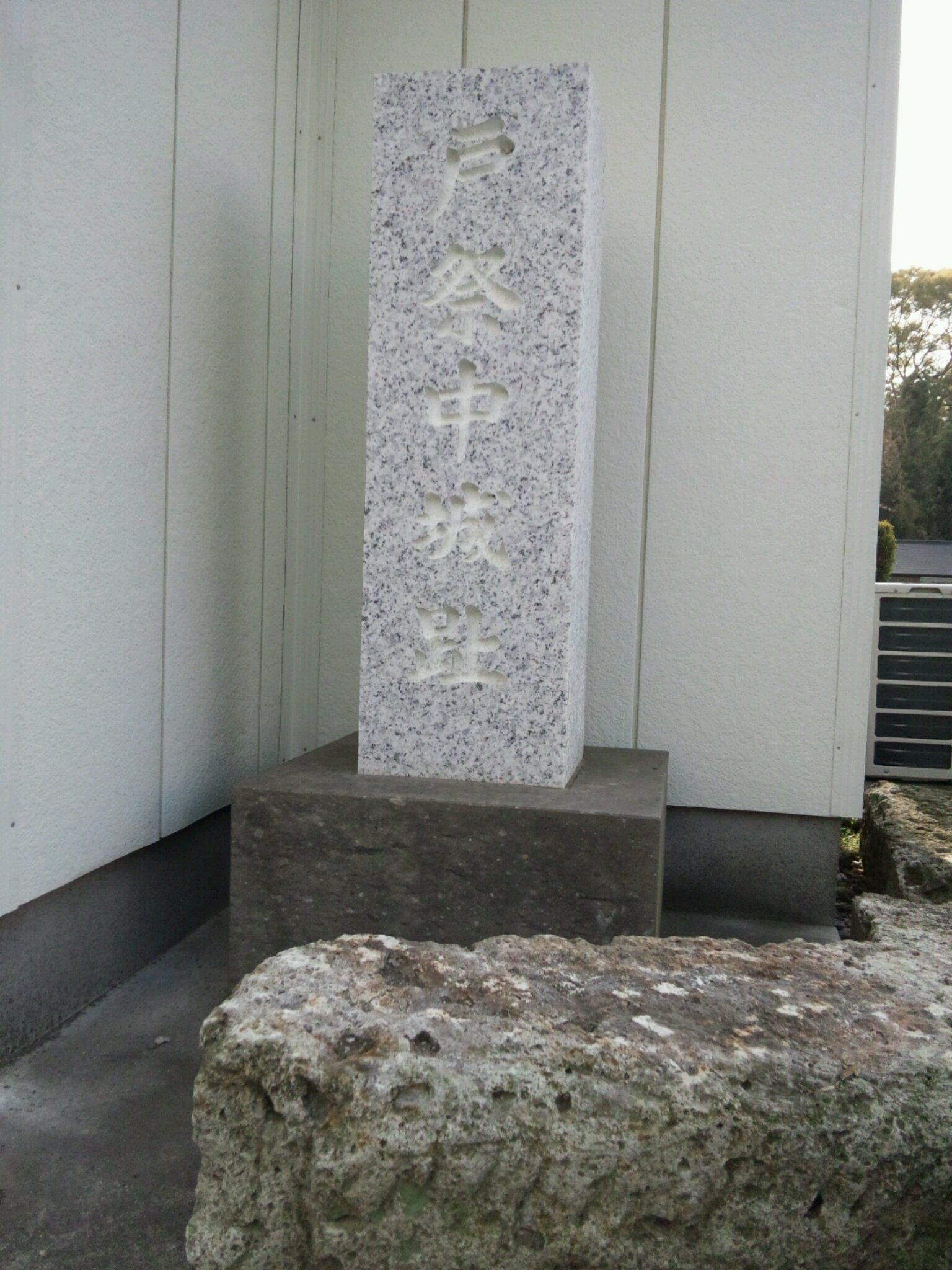 宇都宮氏の家臣として宇都宮に移り住んだ中村氏館の北側太子堂にある戸祭中城址の石碑（宇都宮市戸祭元町）。